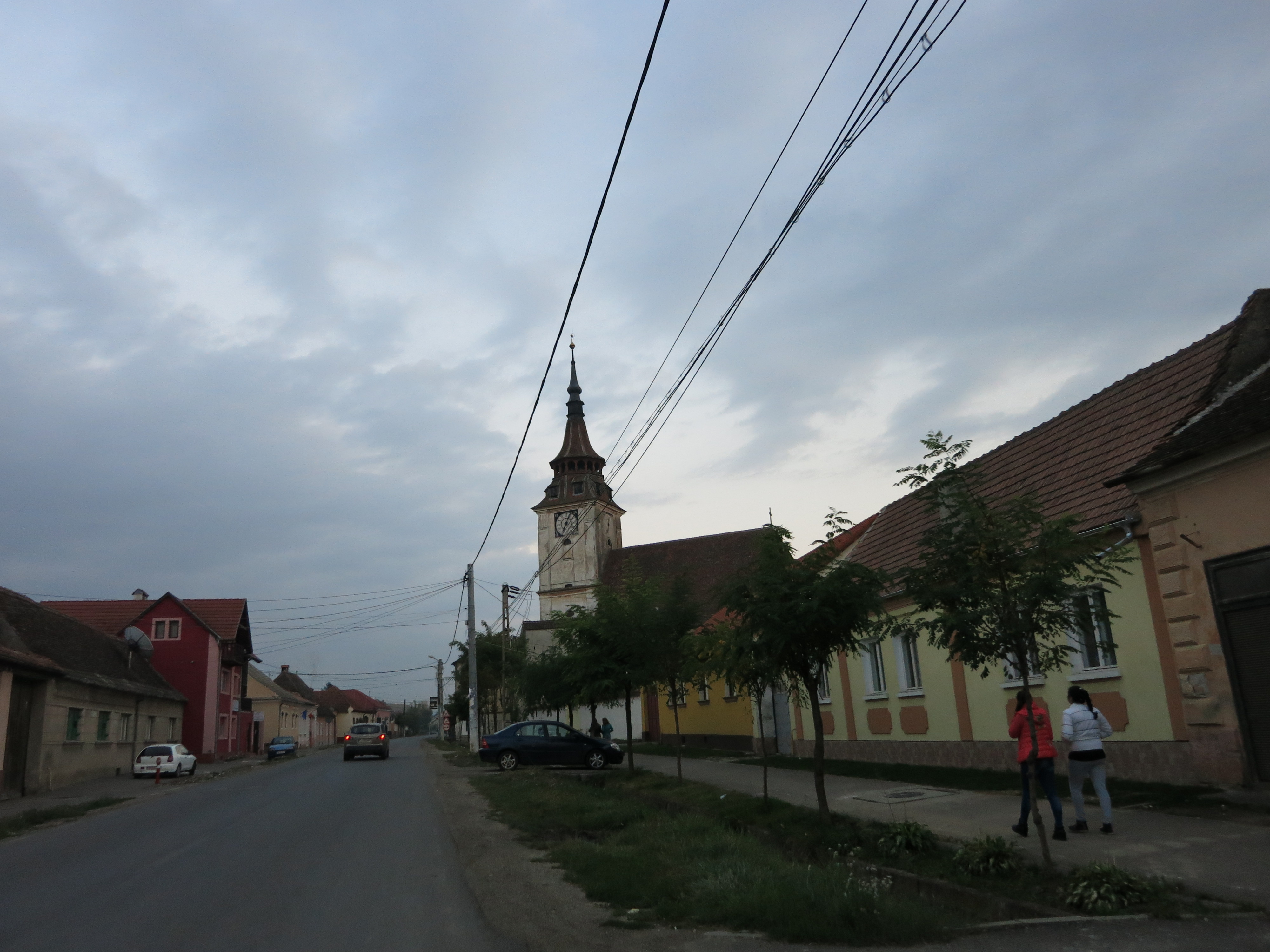 Incintă fortificată interioară, cu turnuri, fosta locuință fortificată de pe latura sudică, încăperi pentru proviziisat Sânpetru, comuna Sânpetru Str. Republicii 641 sec. XV - XVII, Braşov 03